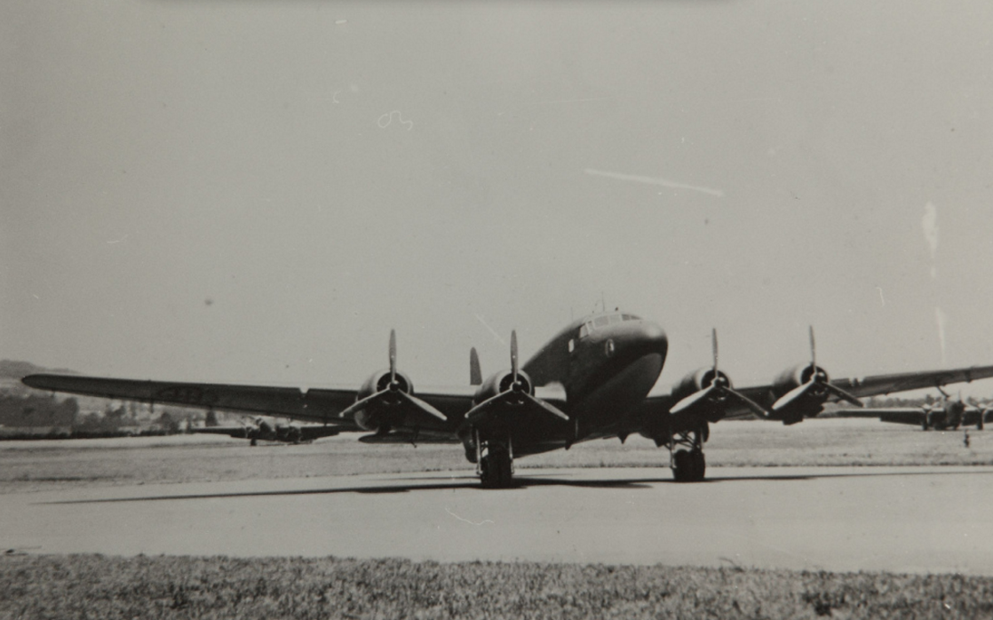 Aereo Savoia Marchetti SM.95